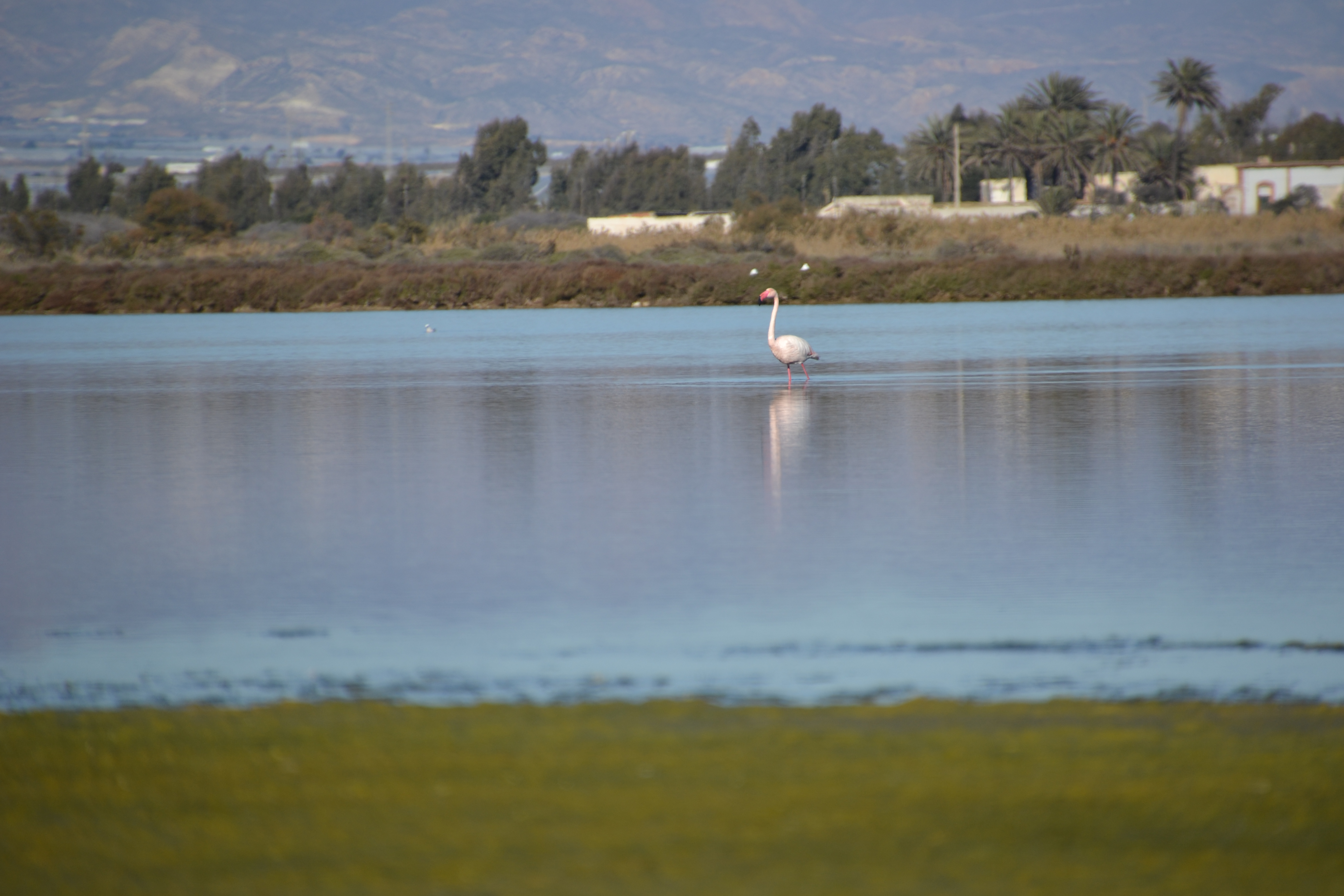 Cabo de Gata - Níjar This is a photography of a Special Area of Conservation in Spain with the ID: ES0000046. Natura2000 entry, EEA entry